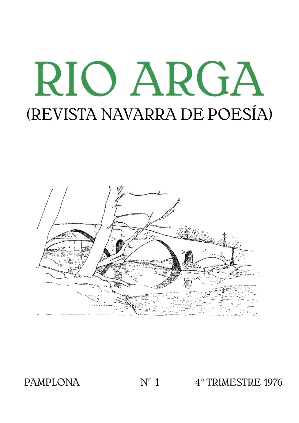 Portada recreada de la Revista Arga Num. 1